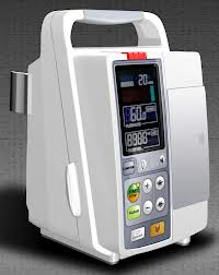 una bomba de infusión es un pequeño dispositivo médico programable que funciona con una batería y administra medicación